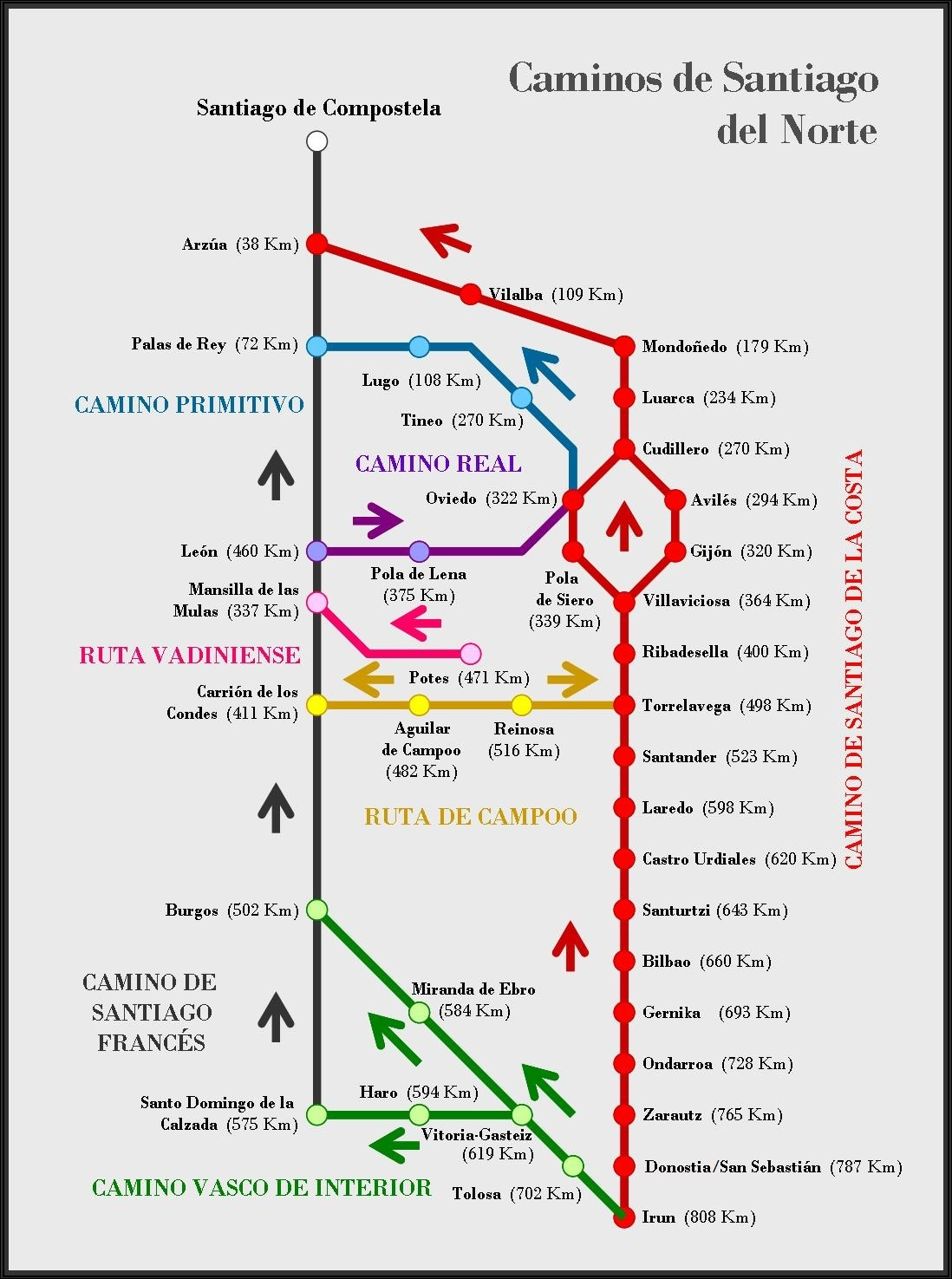 Esquema con los Caminos de Santiago del Norte de España